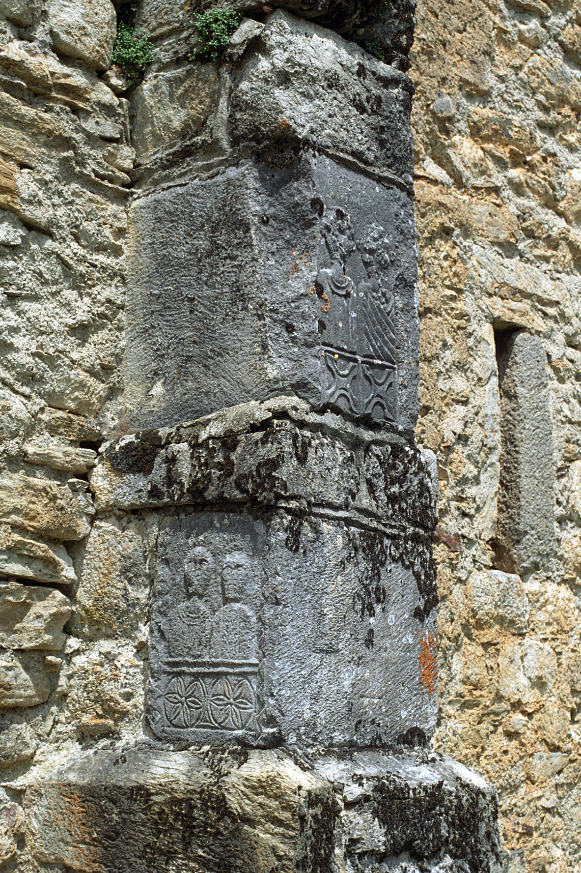 France - Pyrénées - Comminges - Chapelle Saint-Pé de la Moraine